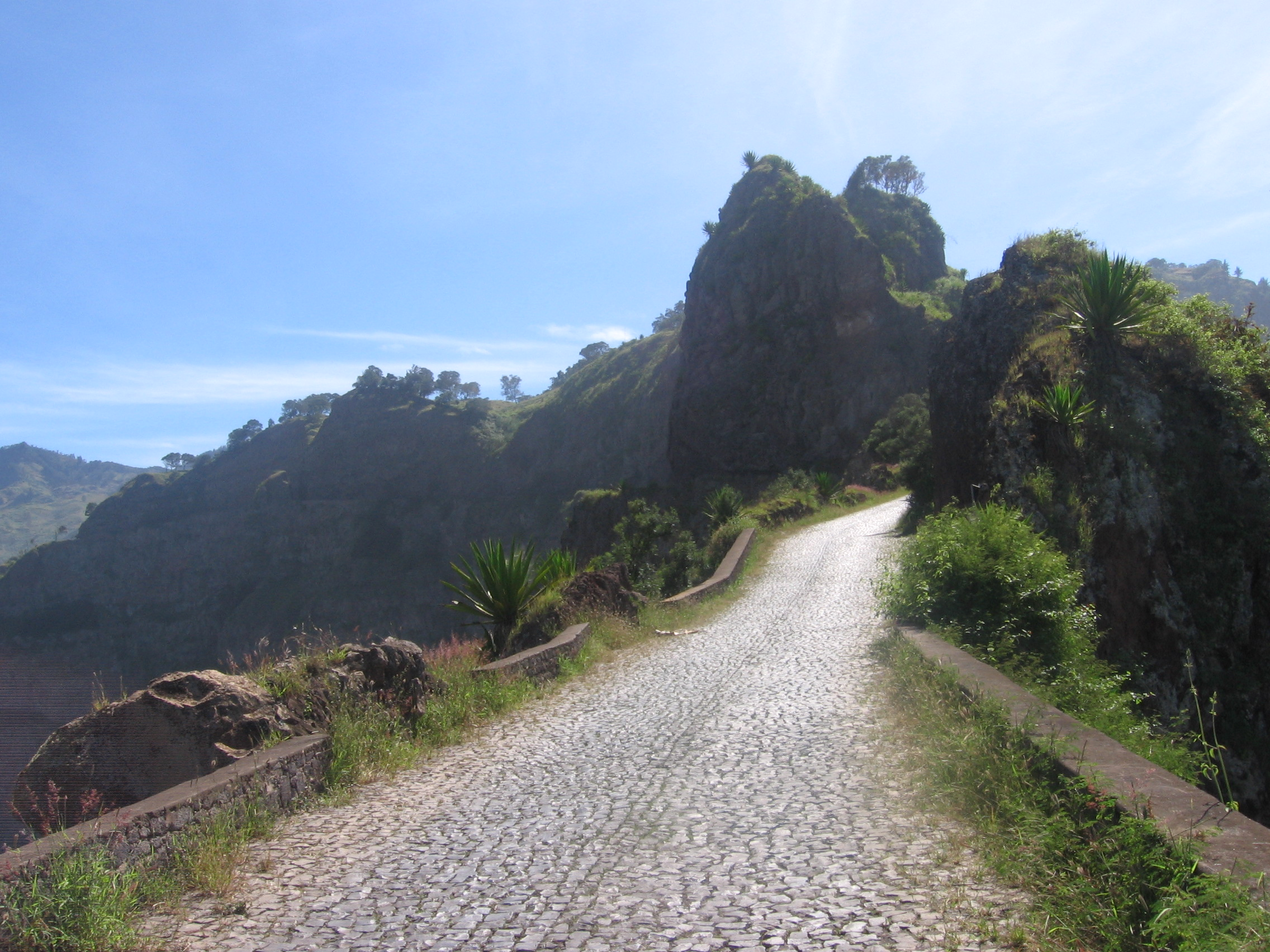 Estrada Corda entre Porto Novo e Ribeira Grande. Santo Antão. Cabo Verde